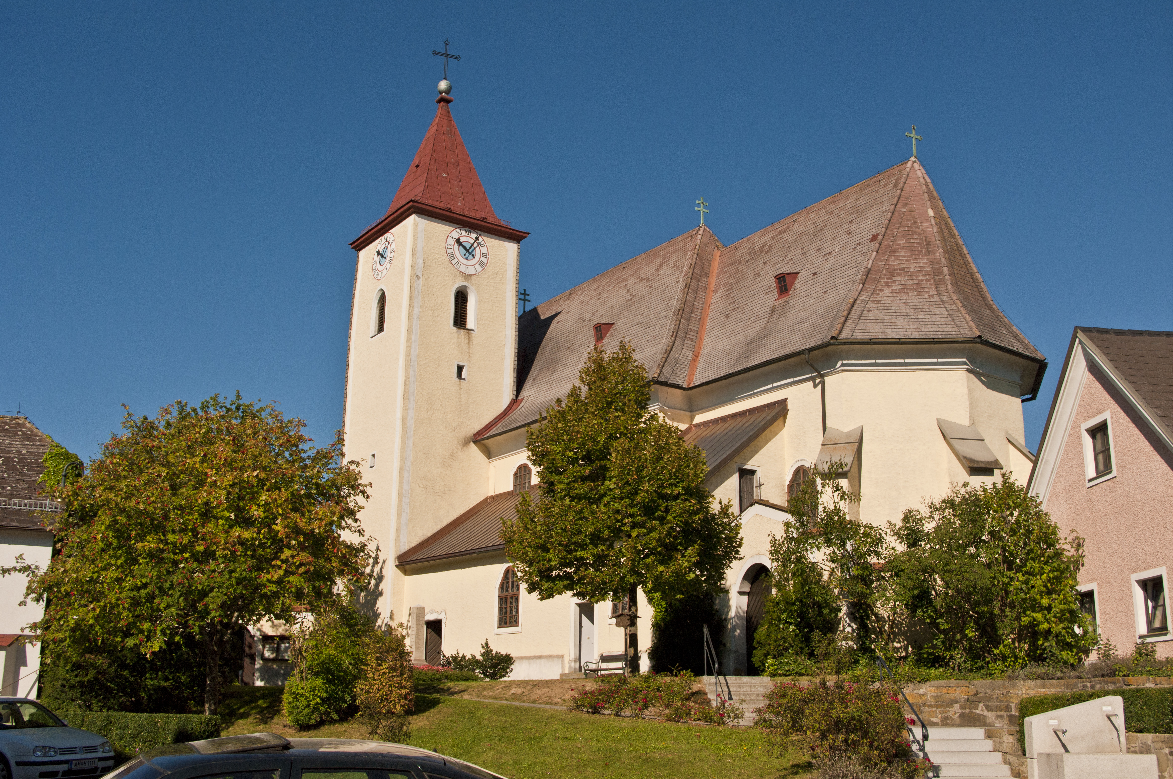 Kath. Pfarrkirche hl. Jakobus maior und Friedhof